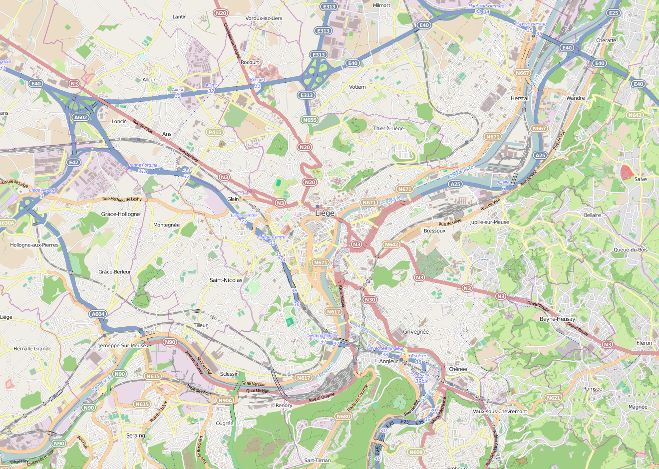 Carte des autoroutes d'accès à Liège